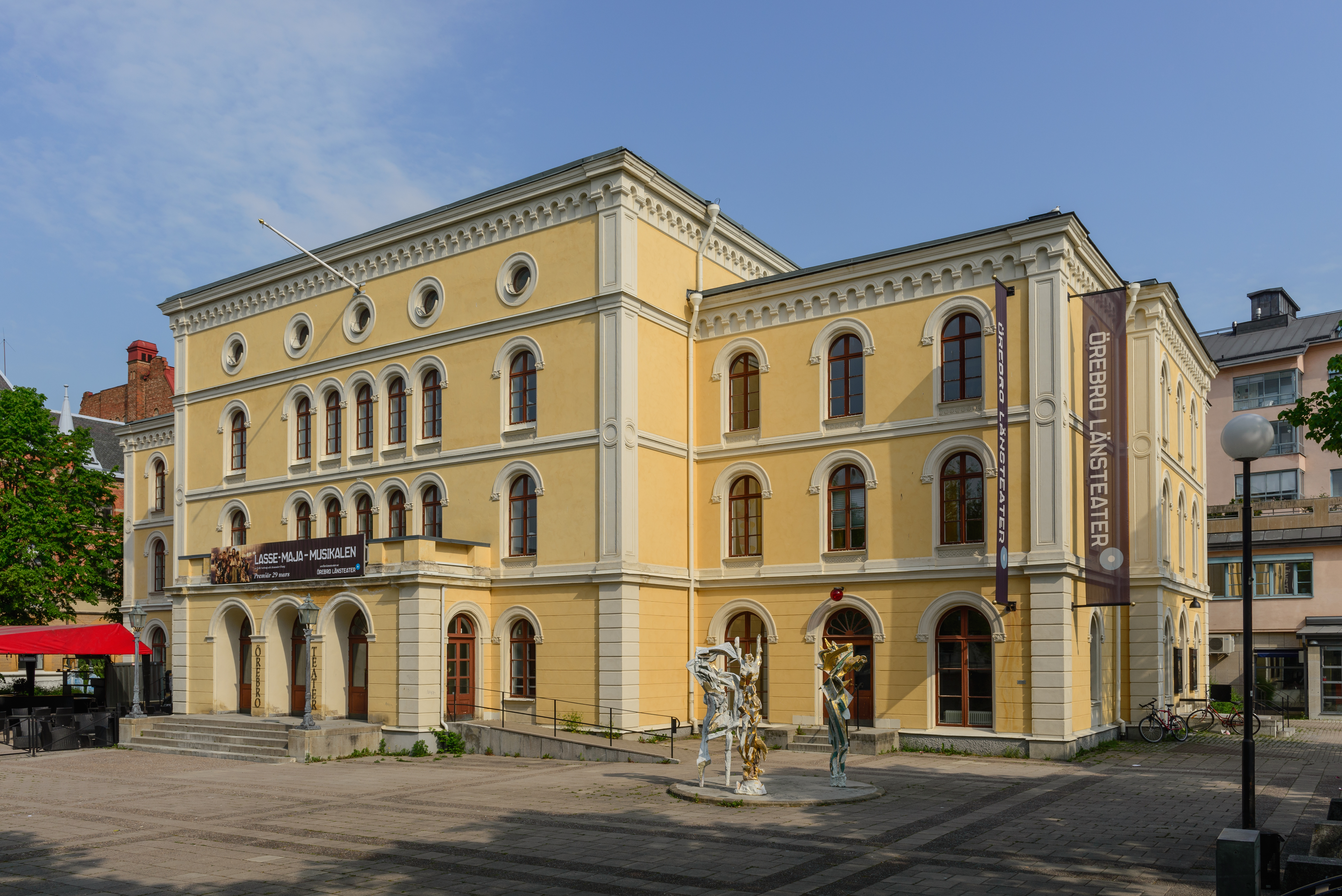 Gamla teatern i Örebro (Teatern 1)